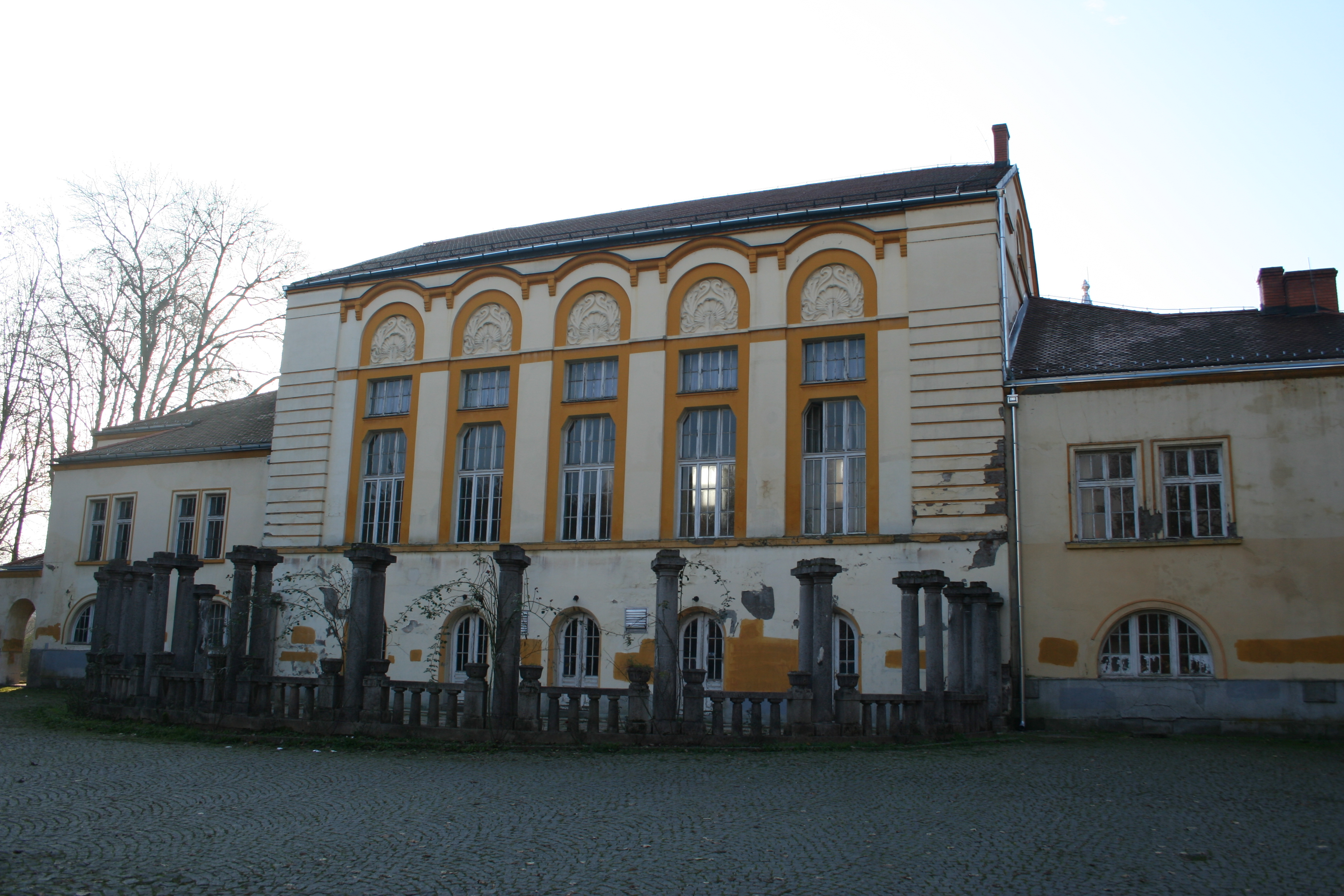 Kursalon, Banja Koviljača